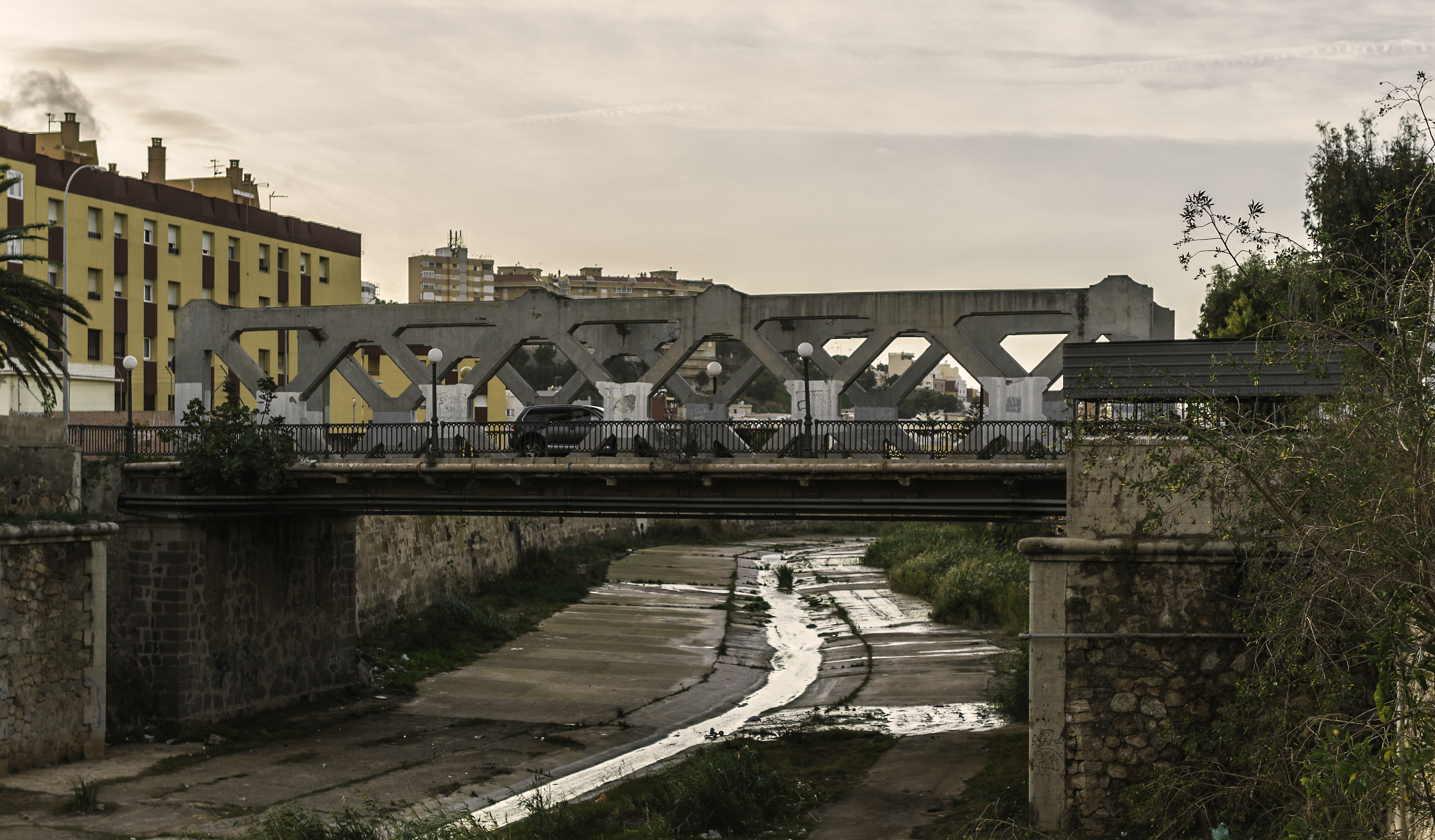 El Puente de los Alemanes, conocido popularmente como Puente del Mineral, es un puente de la arquitectura industrial situado sobre el Río de Oro de Melilla, siendo el quinto puente sobre dicho río y forma parte del Conjunto Histórico Artístico de la Ciudad de Melilla, un Bien de Interés Cultural.